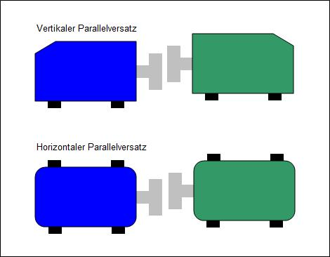 Darstellung von vertikalem sowie horizontalem Parallelversatz